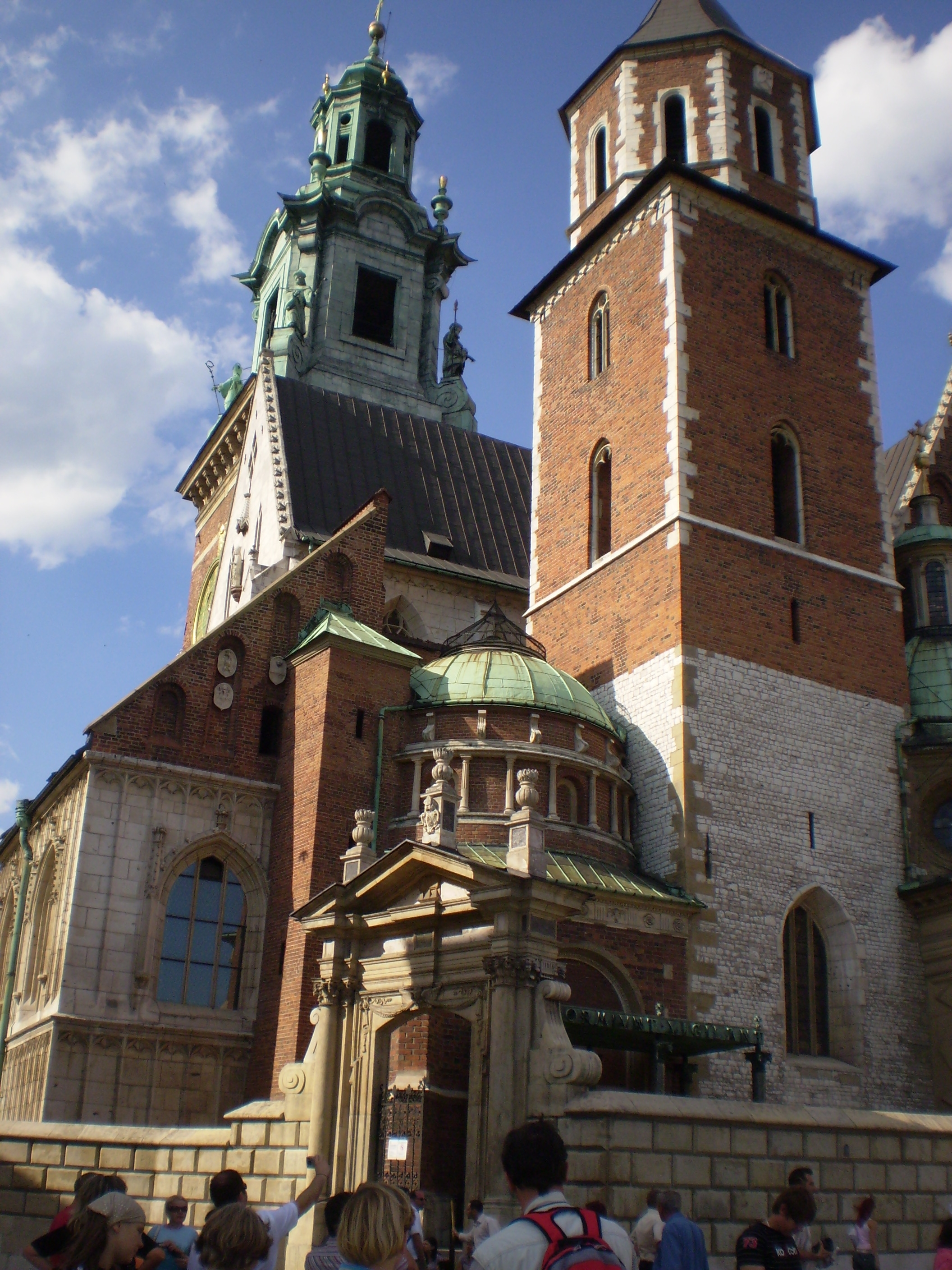 Kraków, Poland